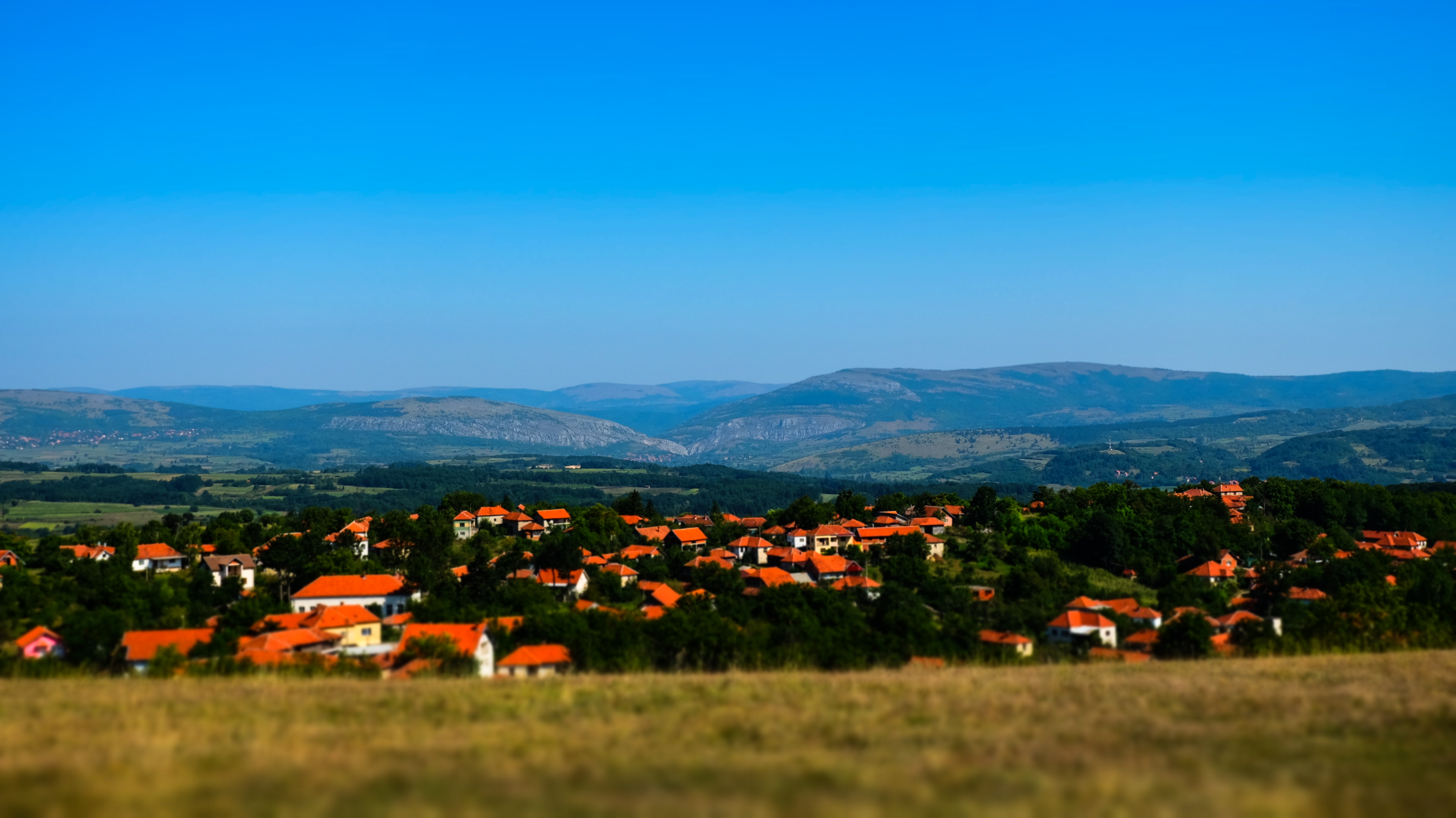 Pogled na selo Prekonoga